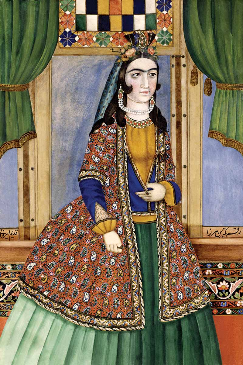 Mah Tələt xanımın portreti